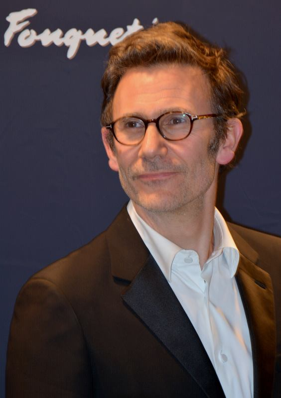 Michel Hazanavicius à la cérémonie des César